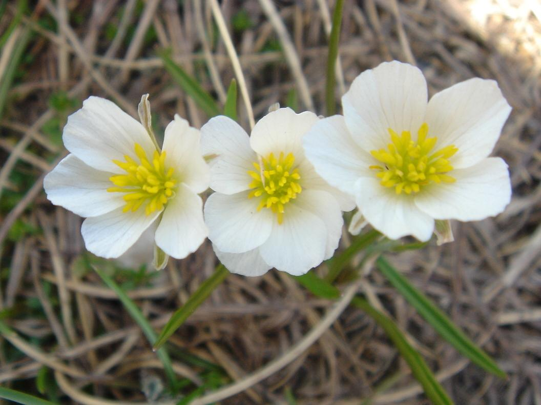 Ranunculus pyrenaeus in Fabrèges, Pyrenees.